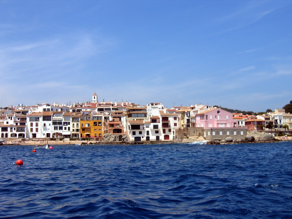 Calella de Palafrugell, Baix Empordà, Catalunya.